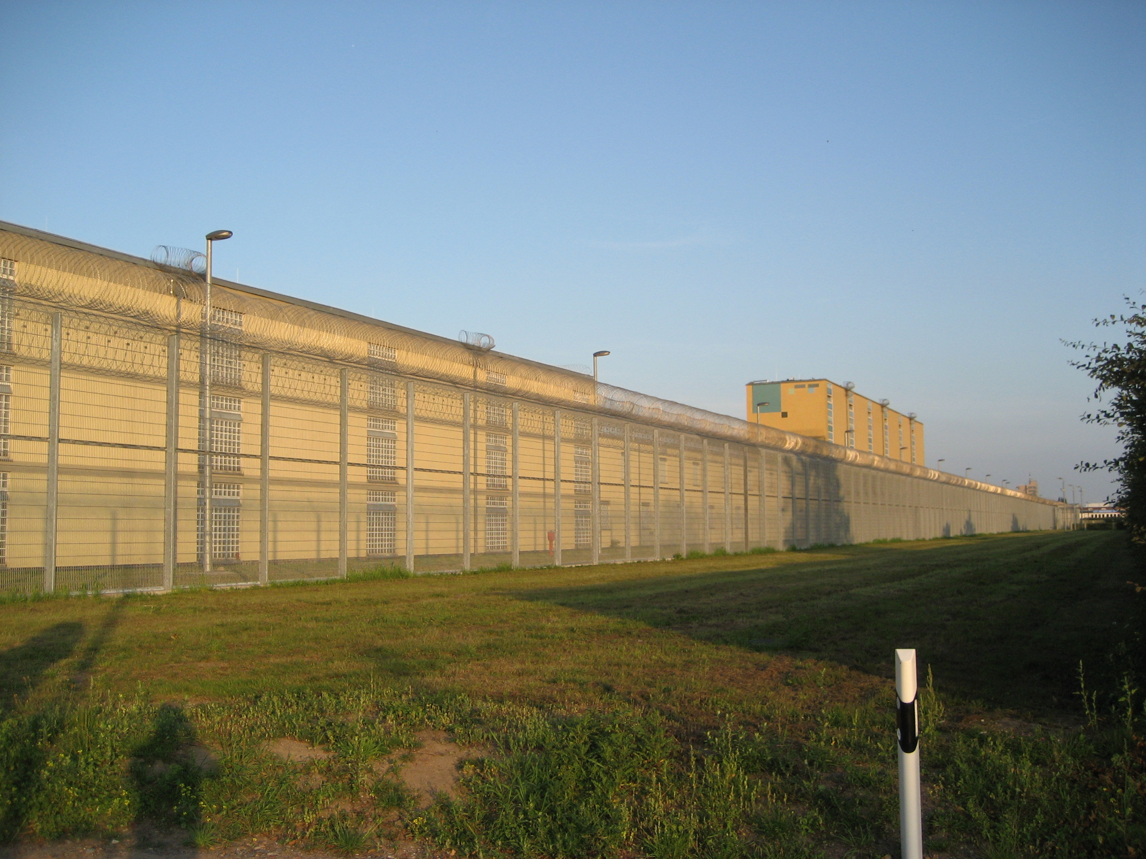 Knast